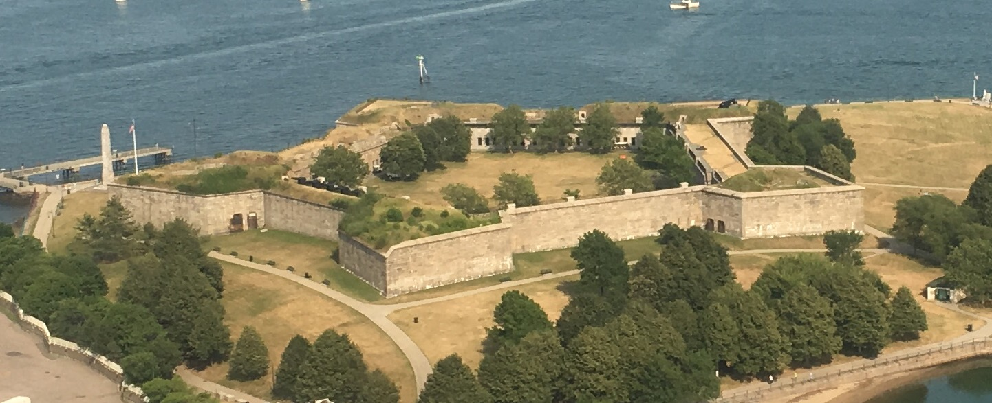 fort independence mass